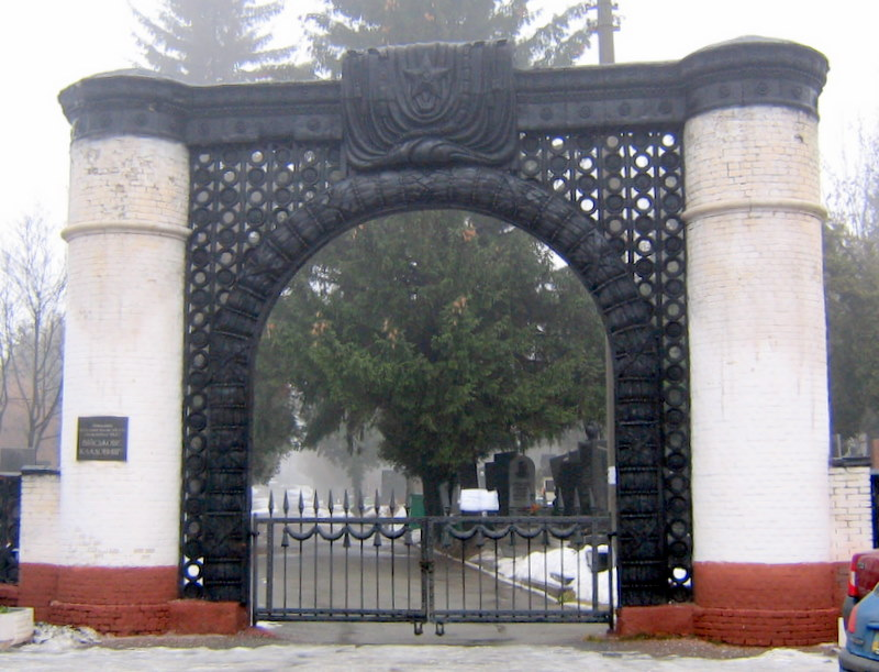 Центральний вхід на Лук'янівьке військове кладовище у Києві